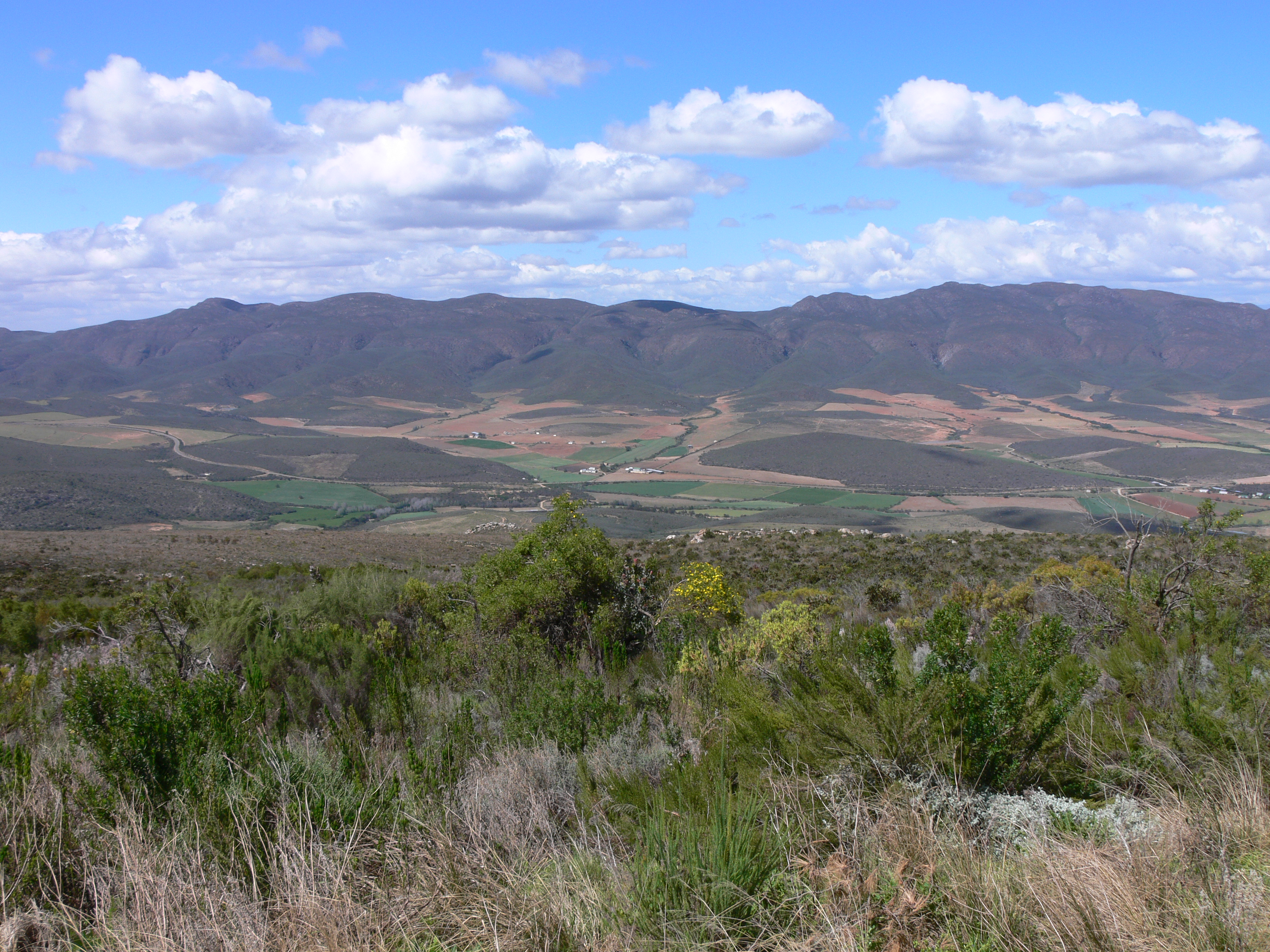 die Swartberge am Horizont, Oudtshoorn, Westkap, Südafrika